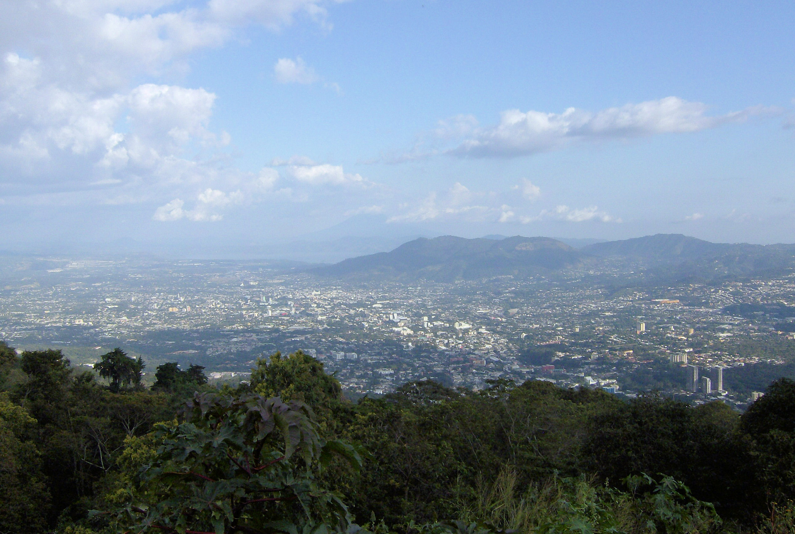 Great San Salvador, seen from volcano.